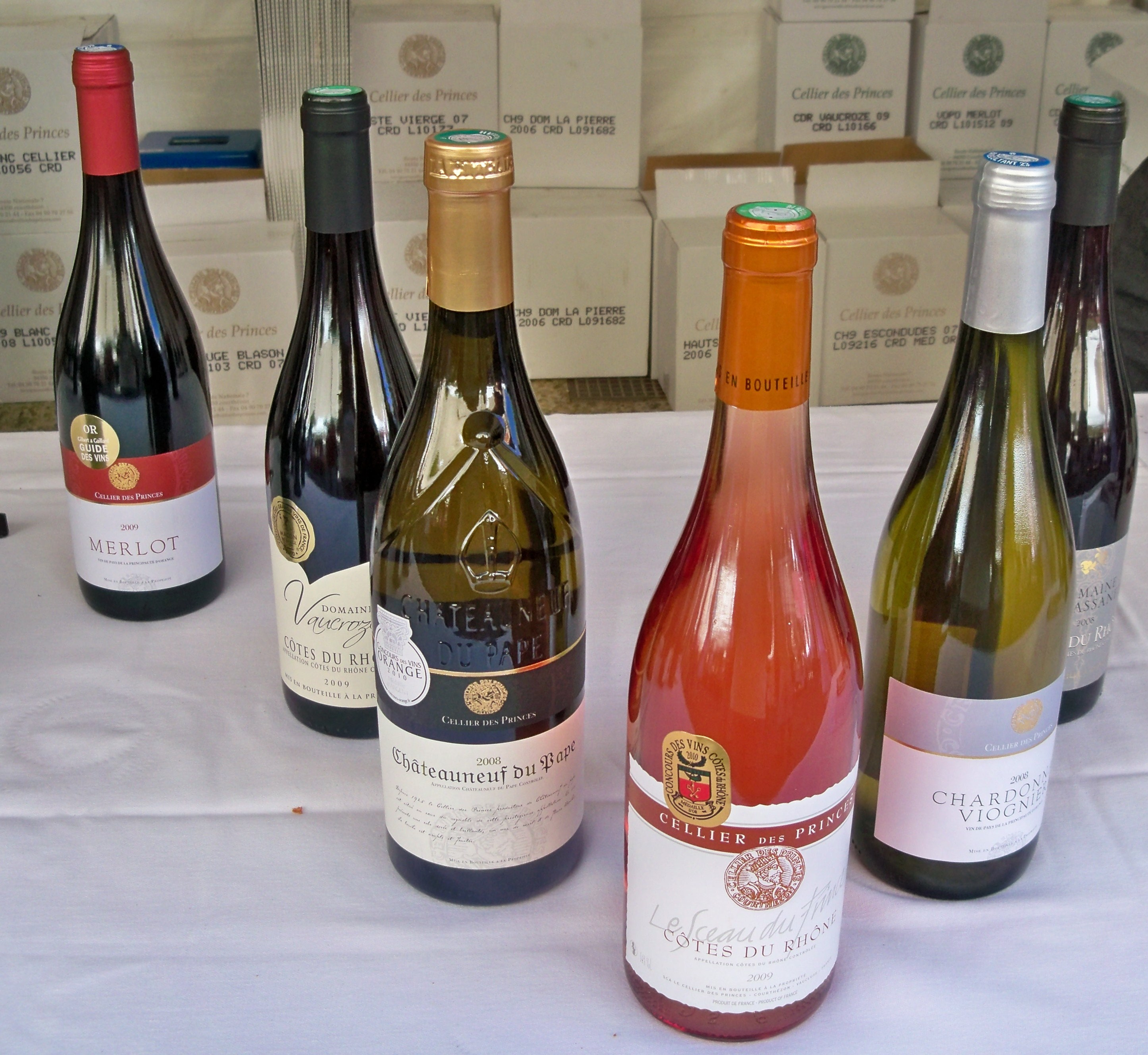 Gamme de la Cave Cellier des Princes : Chateauneuf du Pape rouge et Blanc, Côte du Rhône Rosé